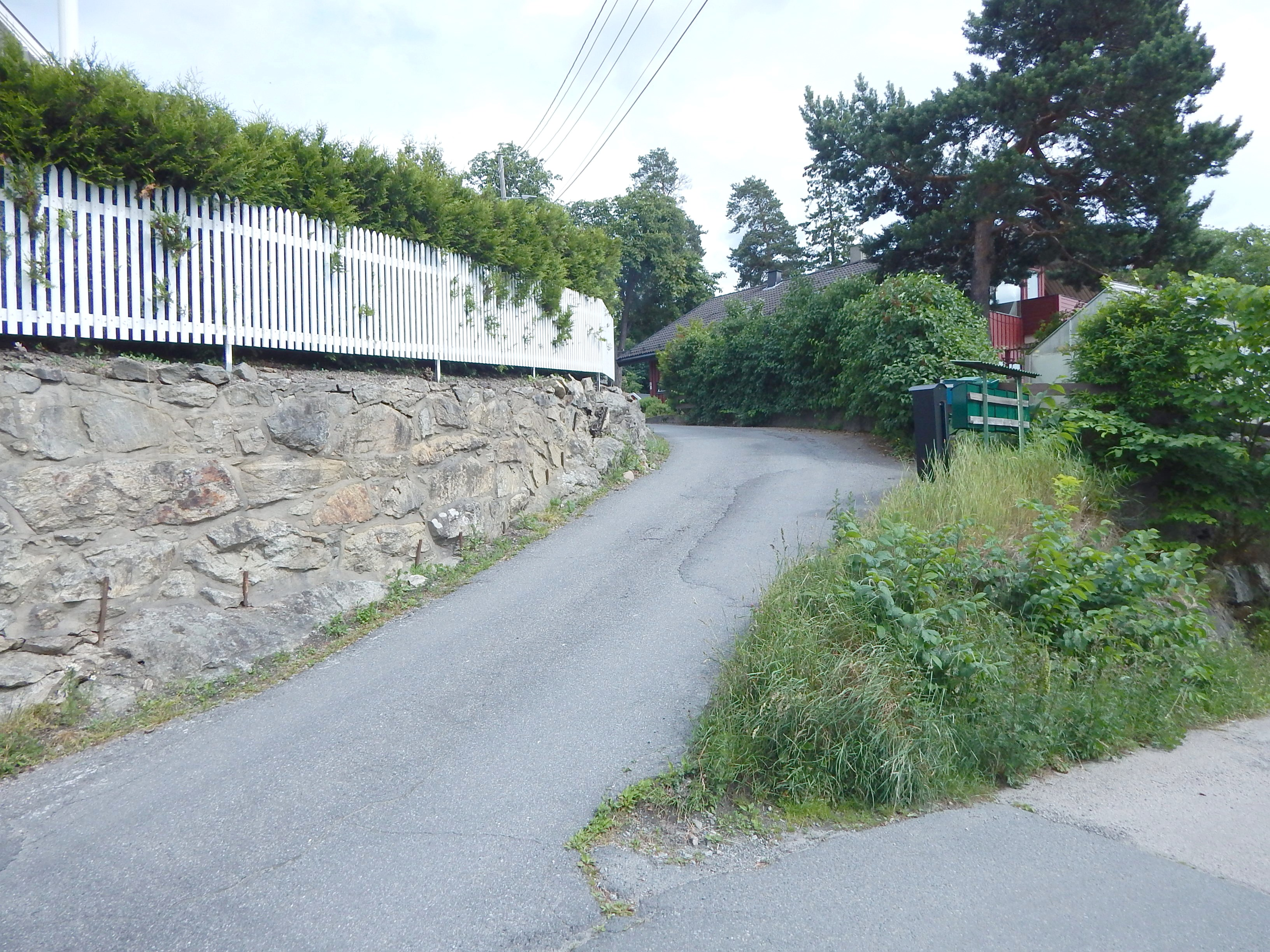 Stalheimbakken sett fra Grottenveien